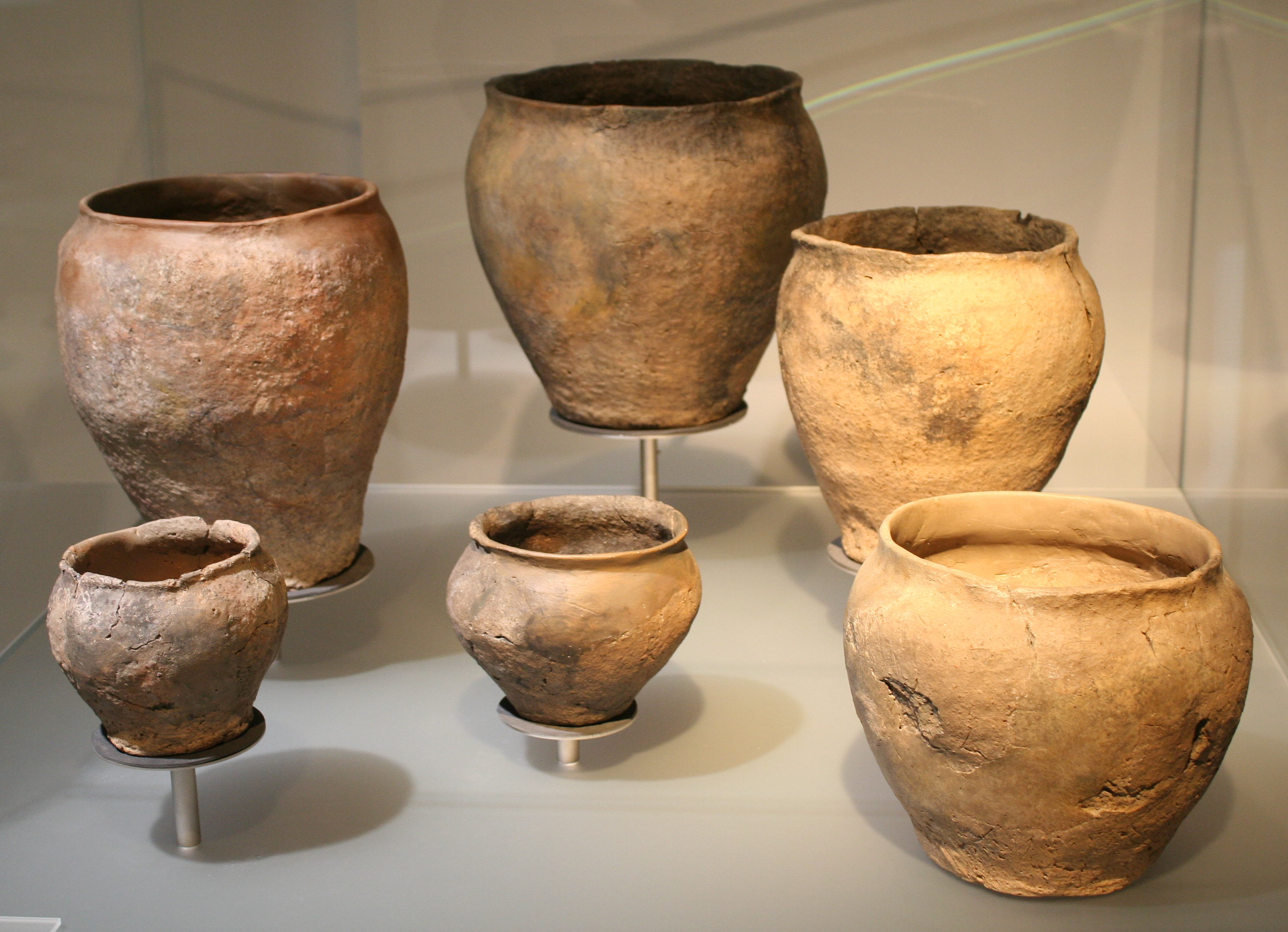 Urnen vom Prager Typ, verschiedene Fundorte, 550-750 n. Chr.; Staatliches Museum für Archäologie Chemnitz